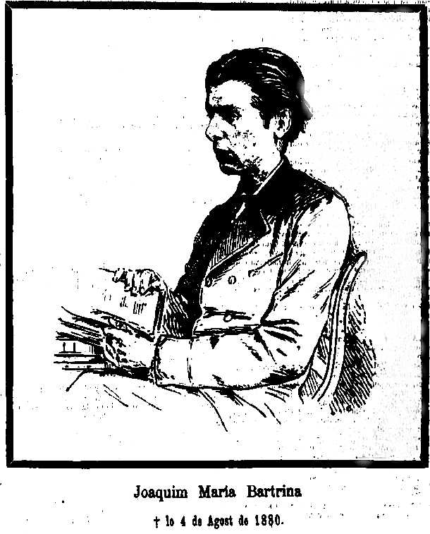 Joaquim Maria Bartrina (1850-1880)